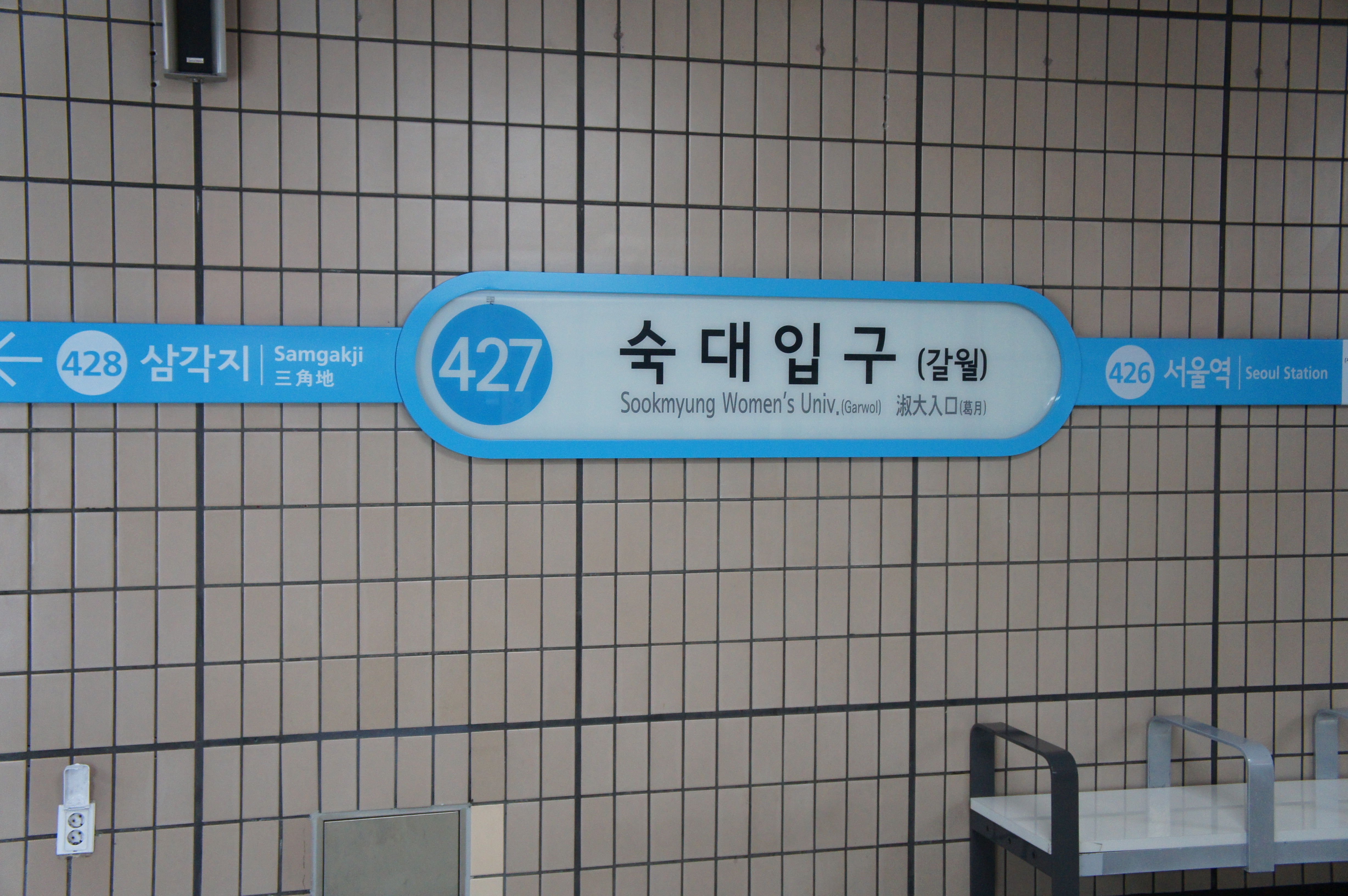 숙대입구역 역명판